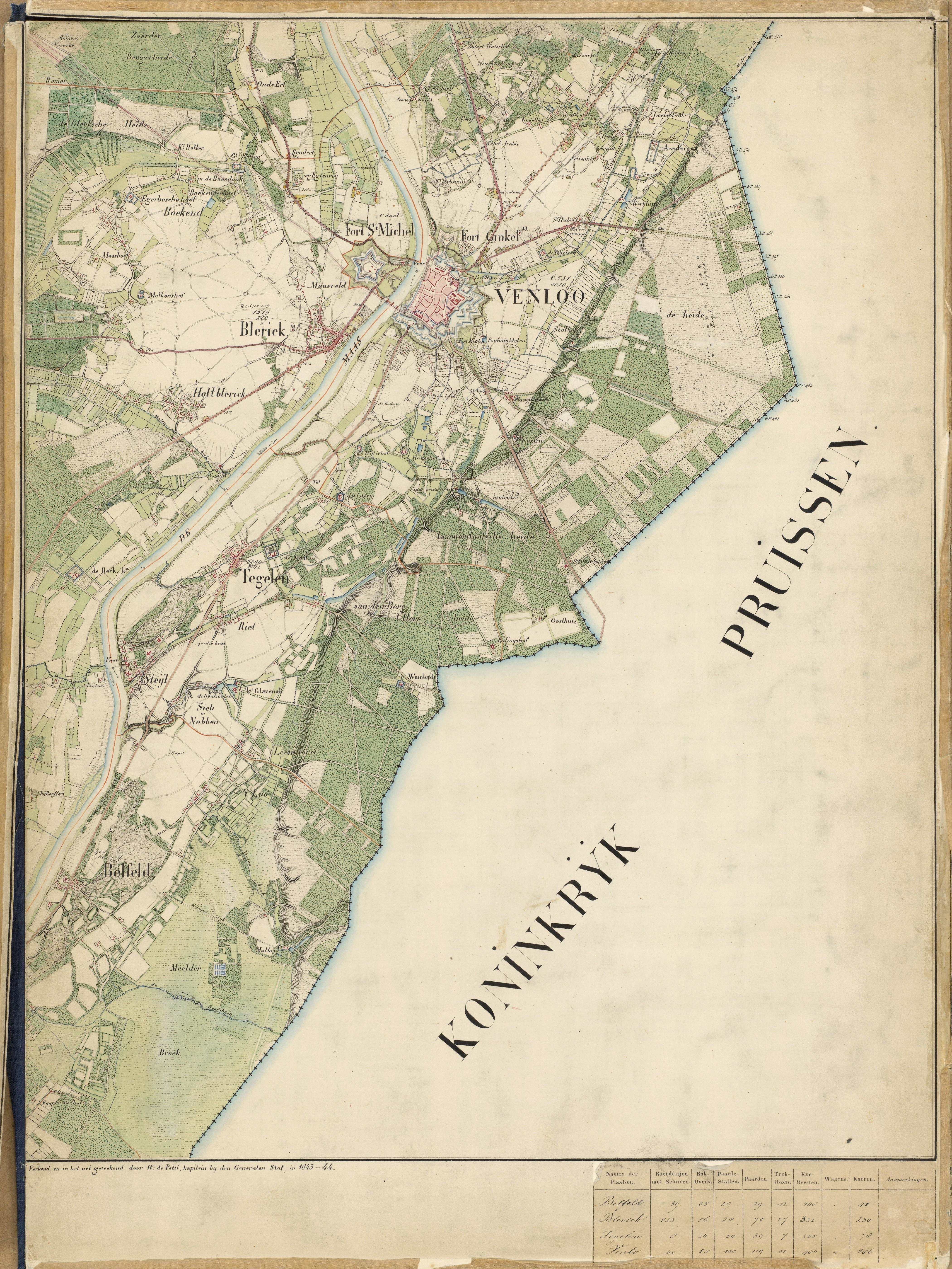 Limburgs: Kaart mit Venlo en de umliggende dörpe oet 1843